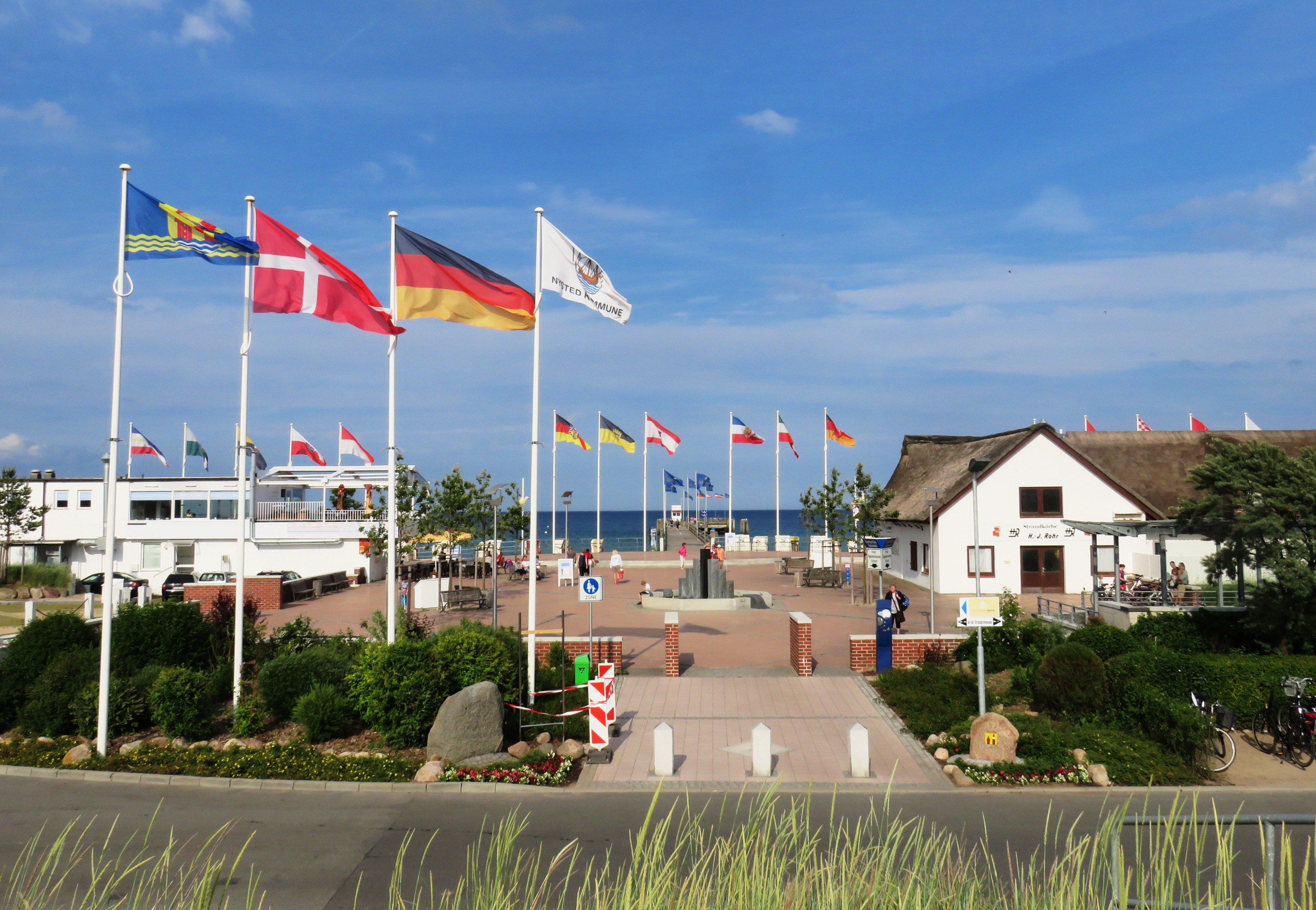 Der Dahmer Nystedplatz, benannt nach der dänischen Partnergemeinde Nysted, liegt zwischen dem Deich und der Seebrücke